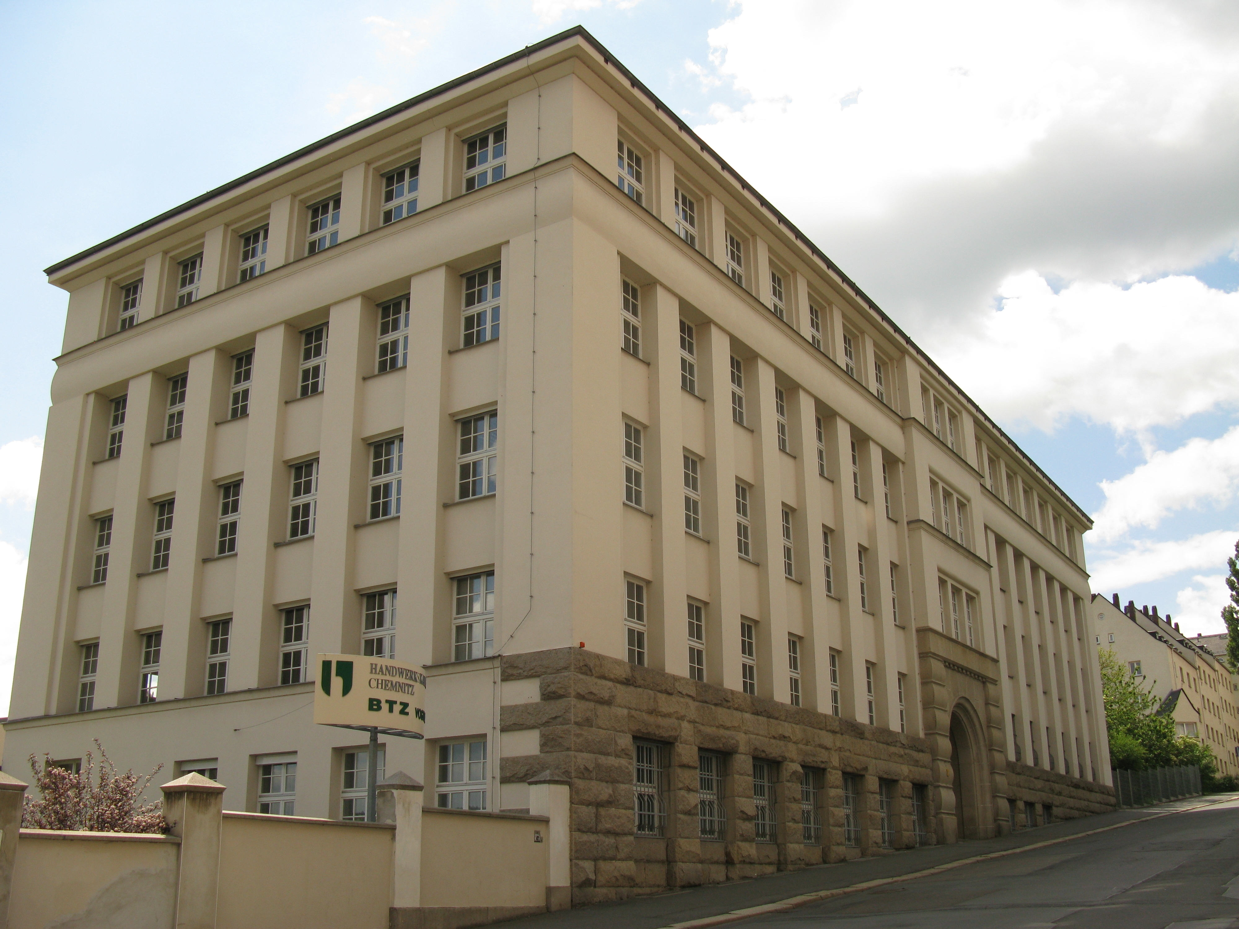 Plauen, denkmalgeschütztes Haus in Rähnisstraße (Rähnisstraße 19). Berufsbildungszentrum der Handwerkskammer Chemnitz